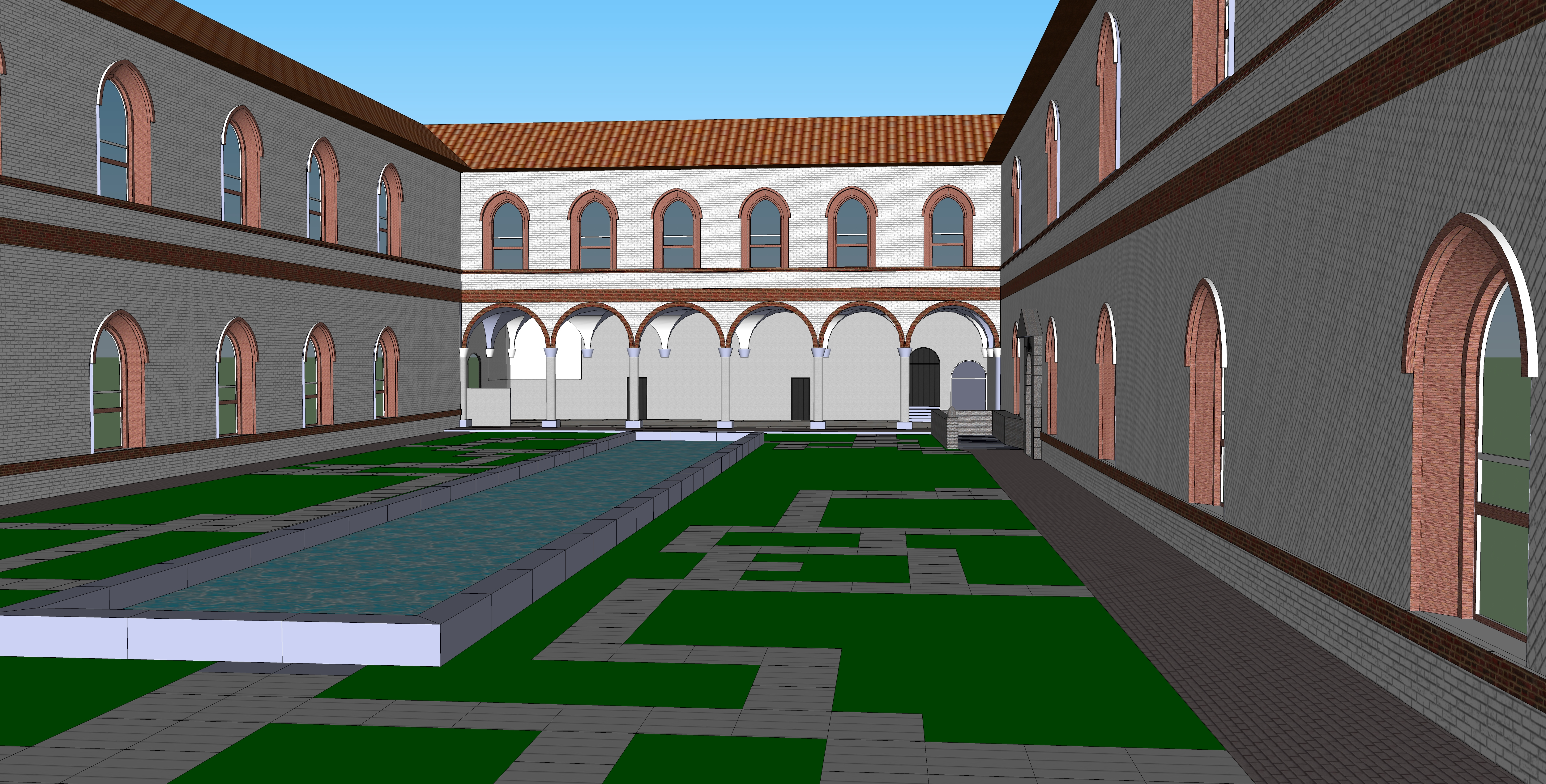 Render Corte interna, Castello Sforzesco di Milano